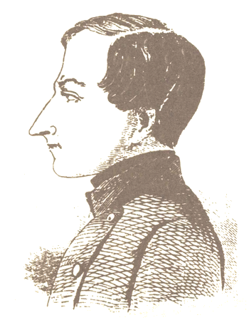 Портрет Гоголя-гимназиста неизвестного художника. Гравюра на дереве впервые опубликована в 1858 году в журнале "Иллюстрация". Возможно портрет создавался позднее под влиянием литографии Э. А. Дмитриева-Мамонова 1852 года